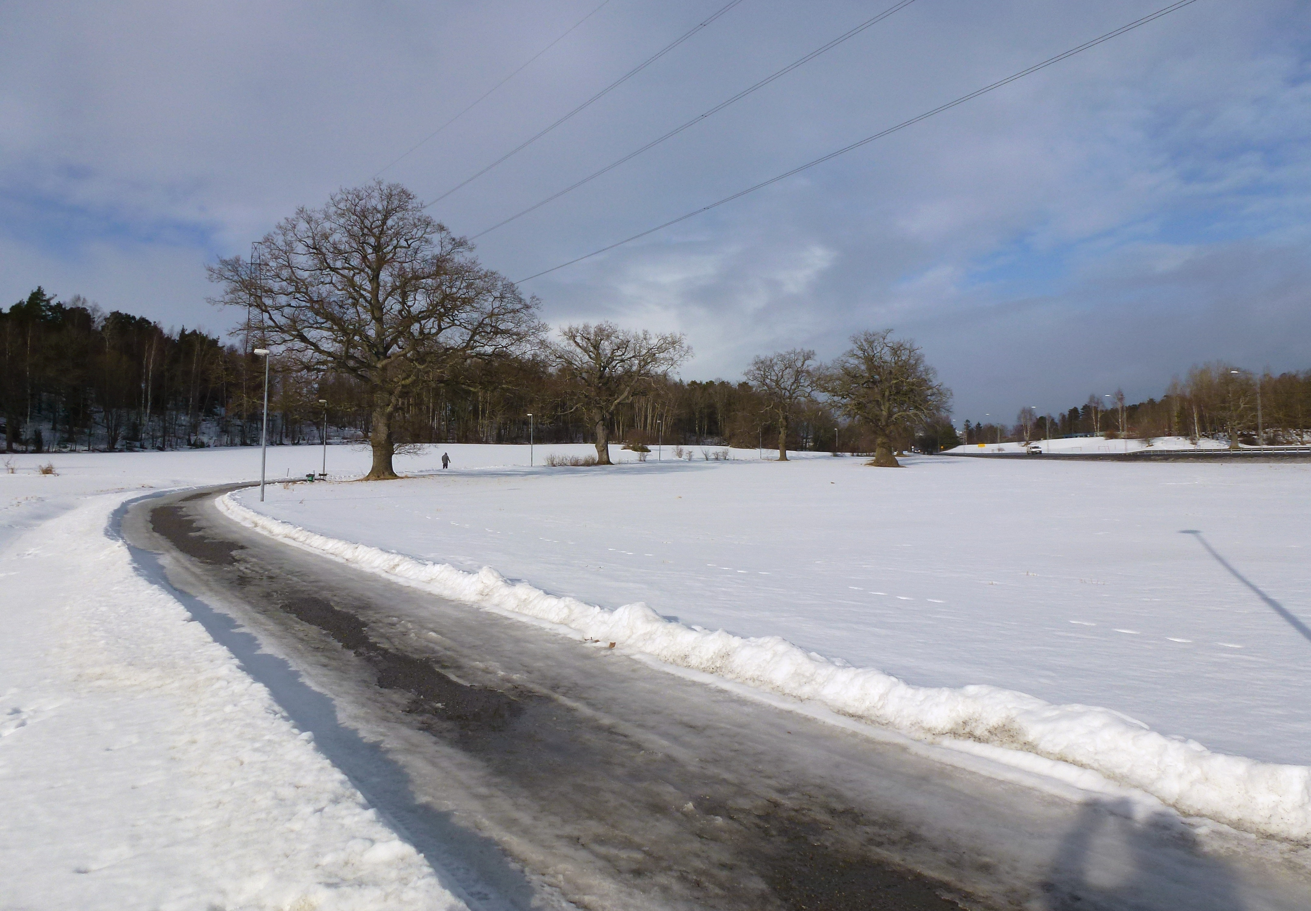 Avsnörd vägbit av den gamla färdvägen (nuvarande Hågelbyleden)